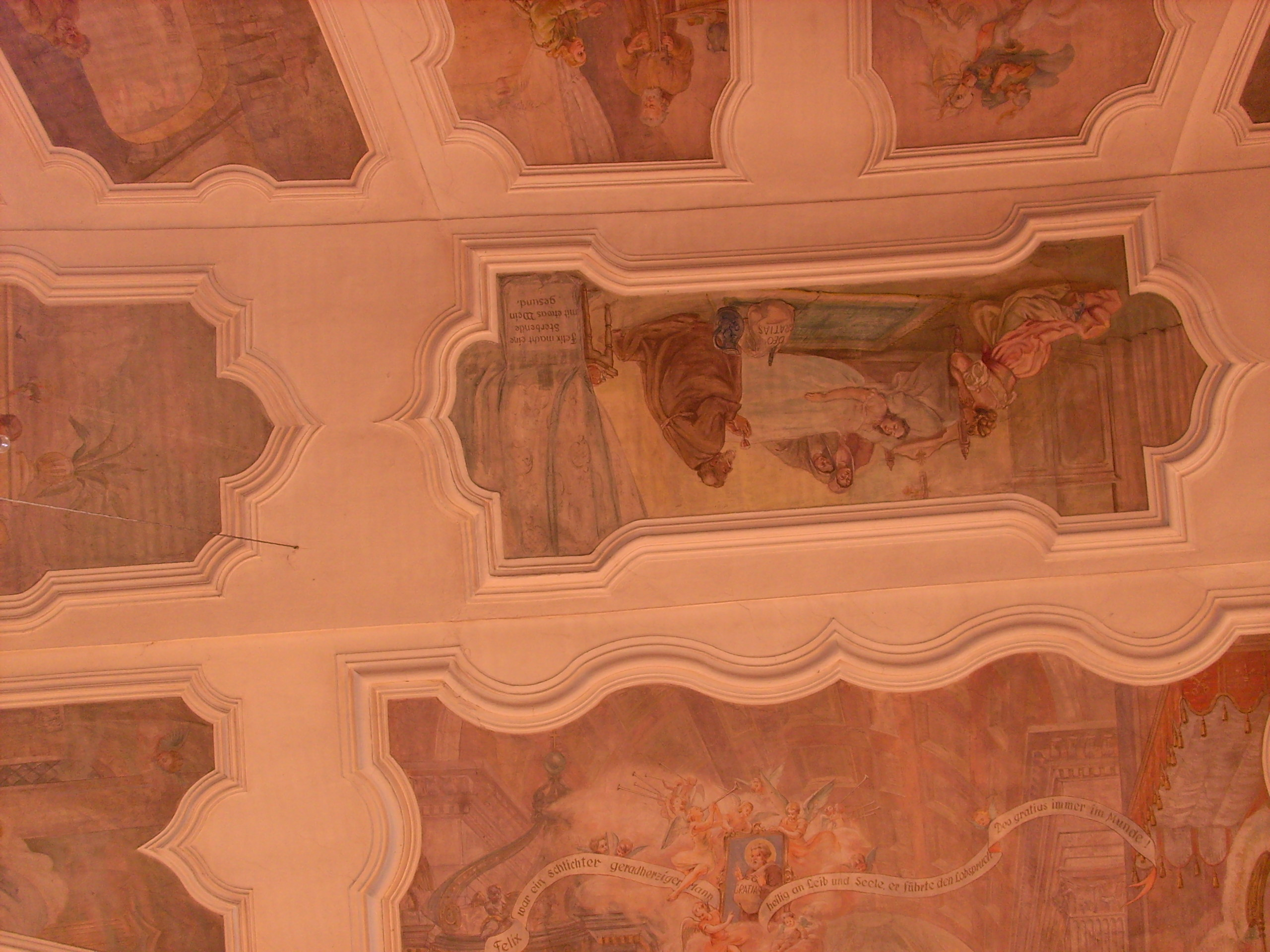 Blick zu den Fresken von St. Felix